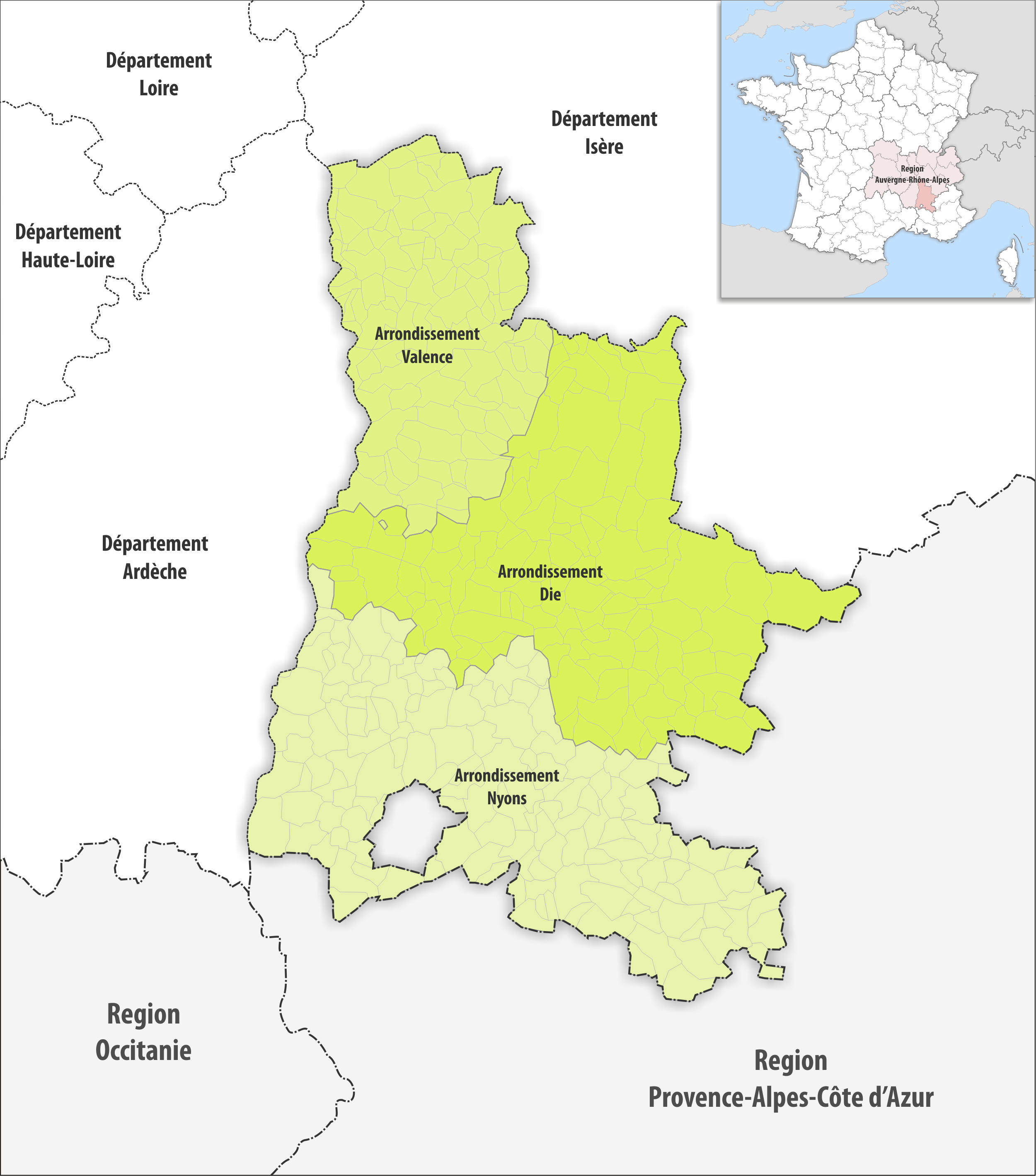 Gemeinden und Arrondissemente im Departement Drôme